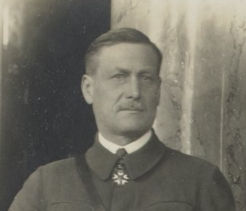 Administrateur supérieur de la Sarre - 17 février 1919-20 novembre 1919